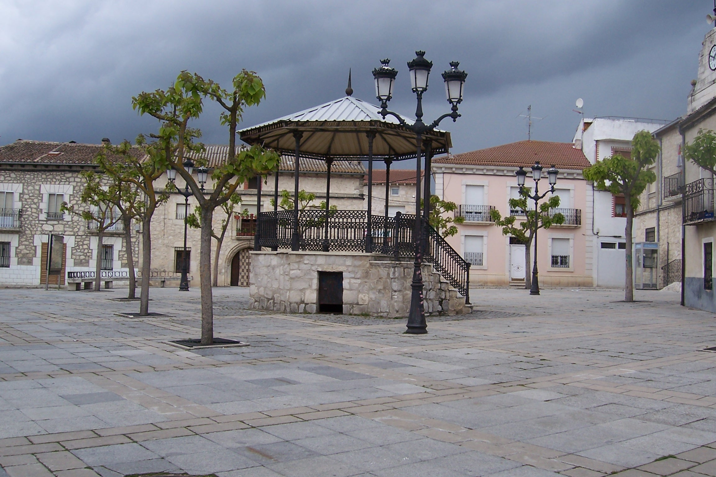 Cogeces del Monte en la Provincia de Valladolid, España. Plaza con el kiosco de la música y el Ayuntamiento.